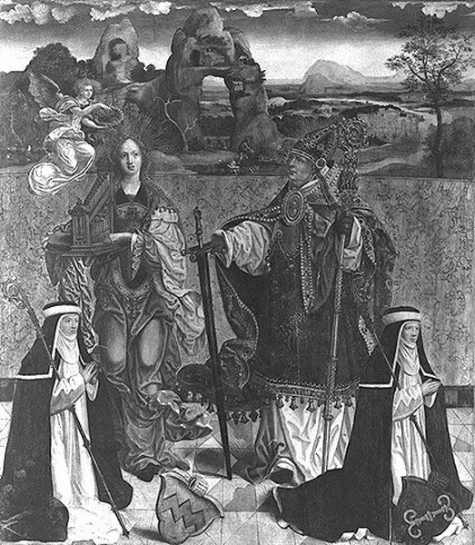 Die heiligen Cäcilie und Paulinus mit den Äbtissinnen Elisabeth von Manderscheid, und Elisabeth von Reven (Letztere Vorsteherin des Klosters der Augustinerinnen am Cäcilienklster Köln). Linker Flügel eines Altares, Niederlande?, um 1515–1530. Köln, Wallraf-Richartz-Museum, Inv.-Nr. WRM 048